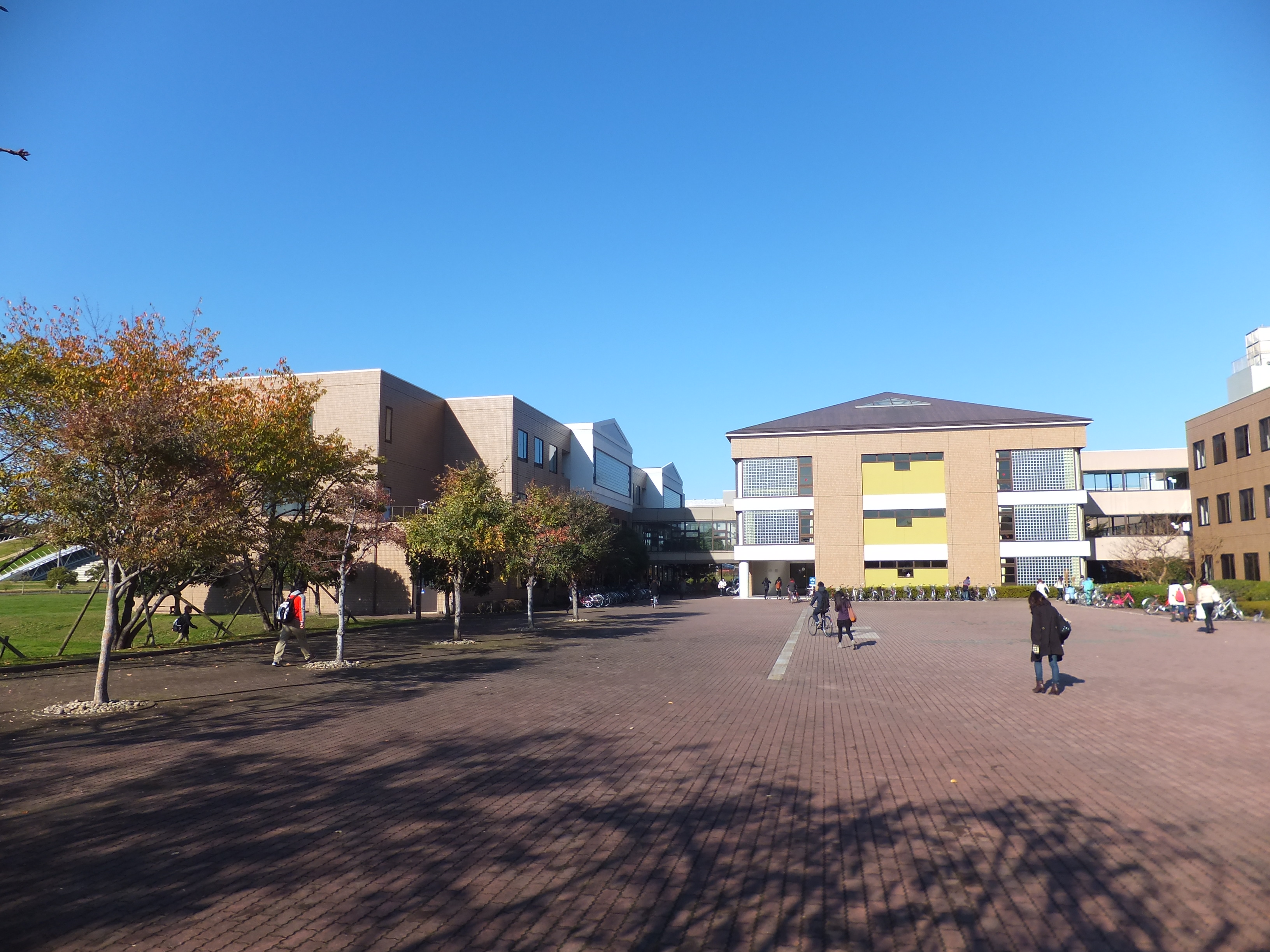 神田外語大学キャンパス